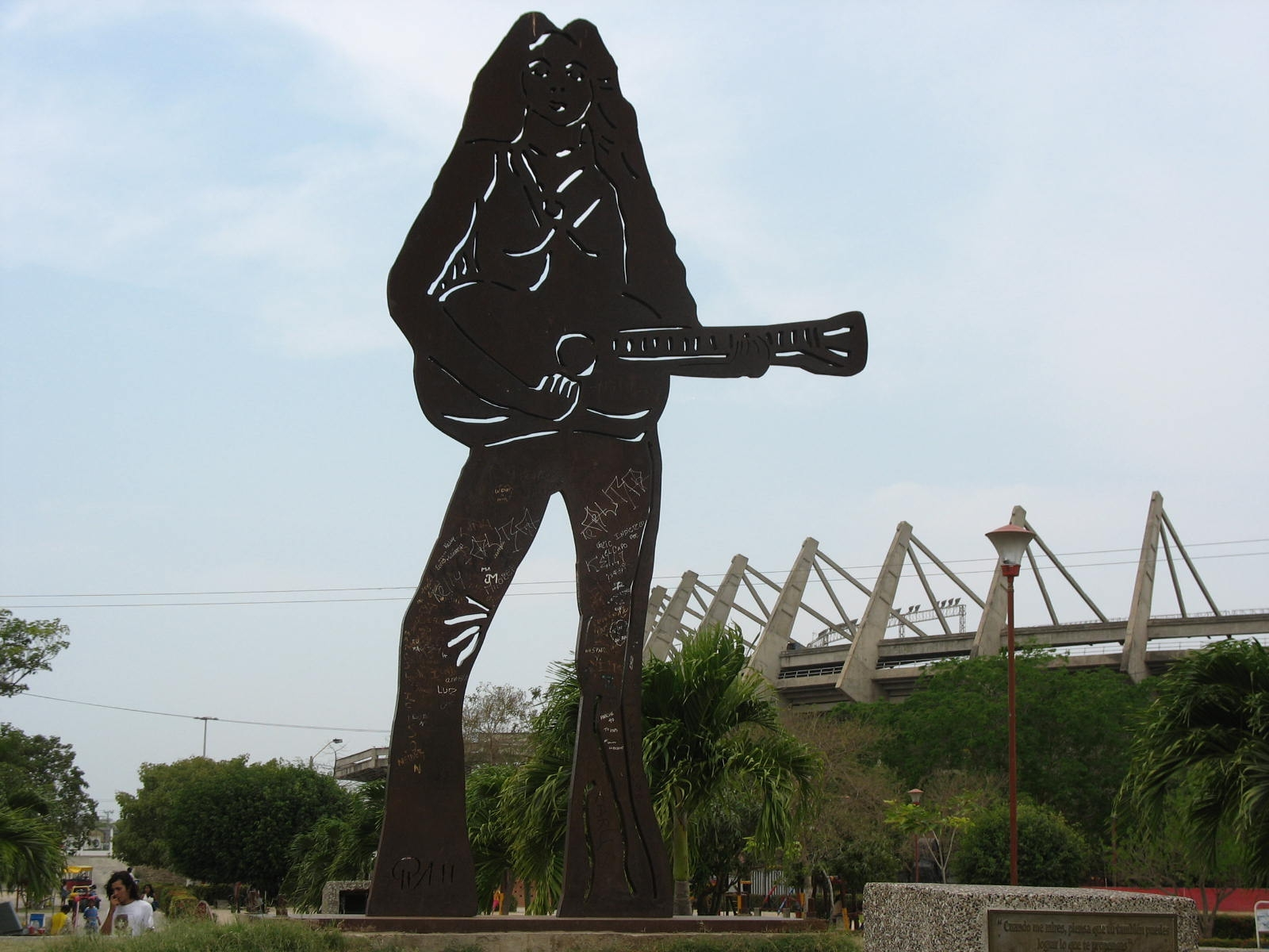 Escultura de Shakira